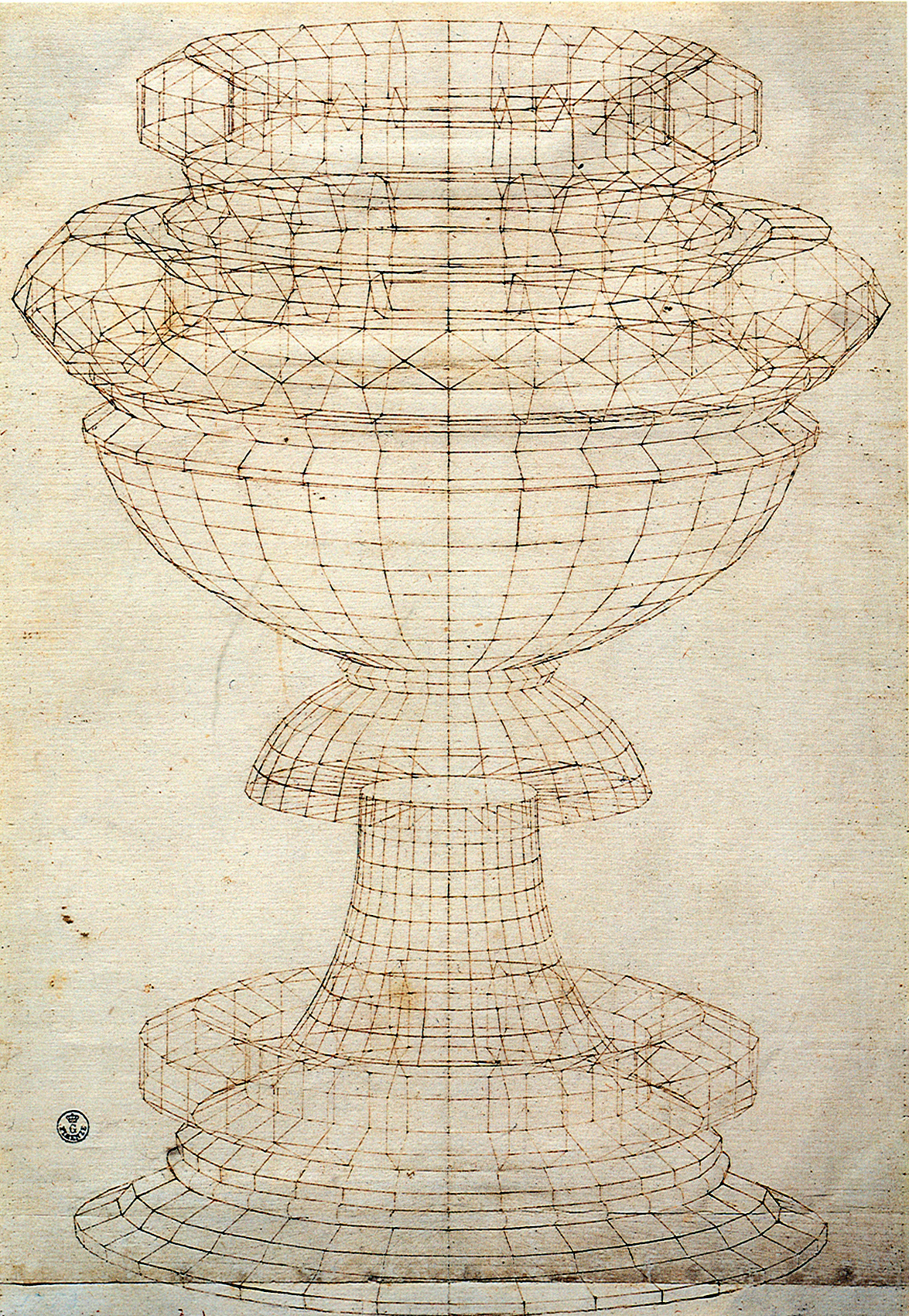 Vase in perspective Paolo Uccello Pen on paper Florence, Galleria degli Uffizi, Gabinetto dei Disegni